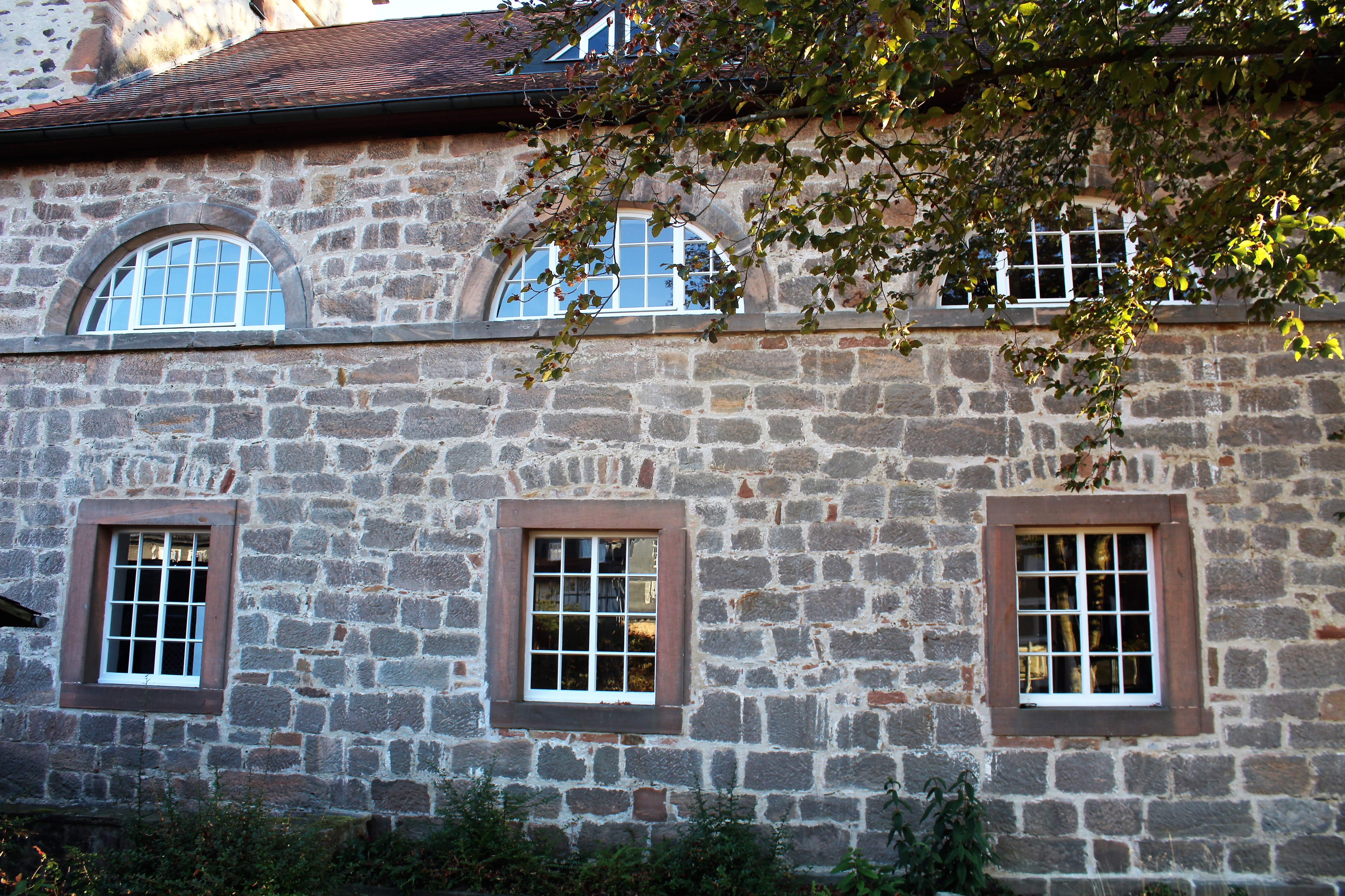 Evangelische Kirche Sterzhausen, Lahntal, Landkreis Marburg-Biedenkopf, Hessen, Deutschland